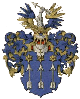 Tideböhli suguvõsa aadlivapp